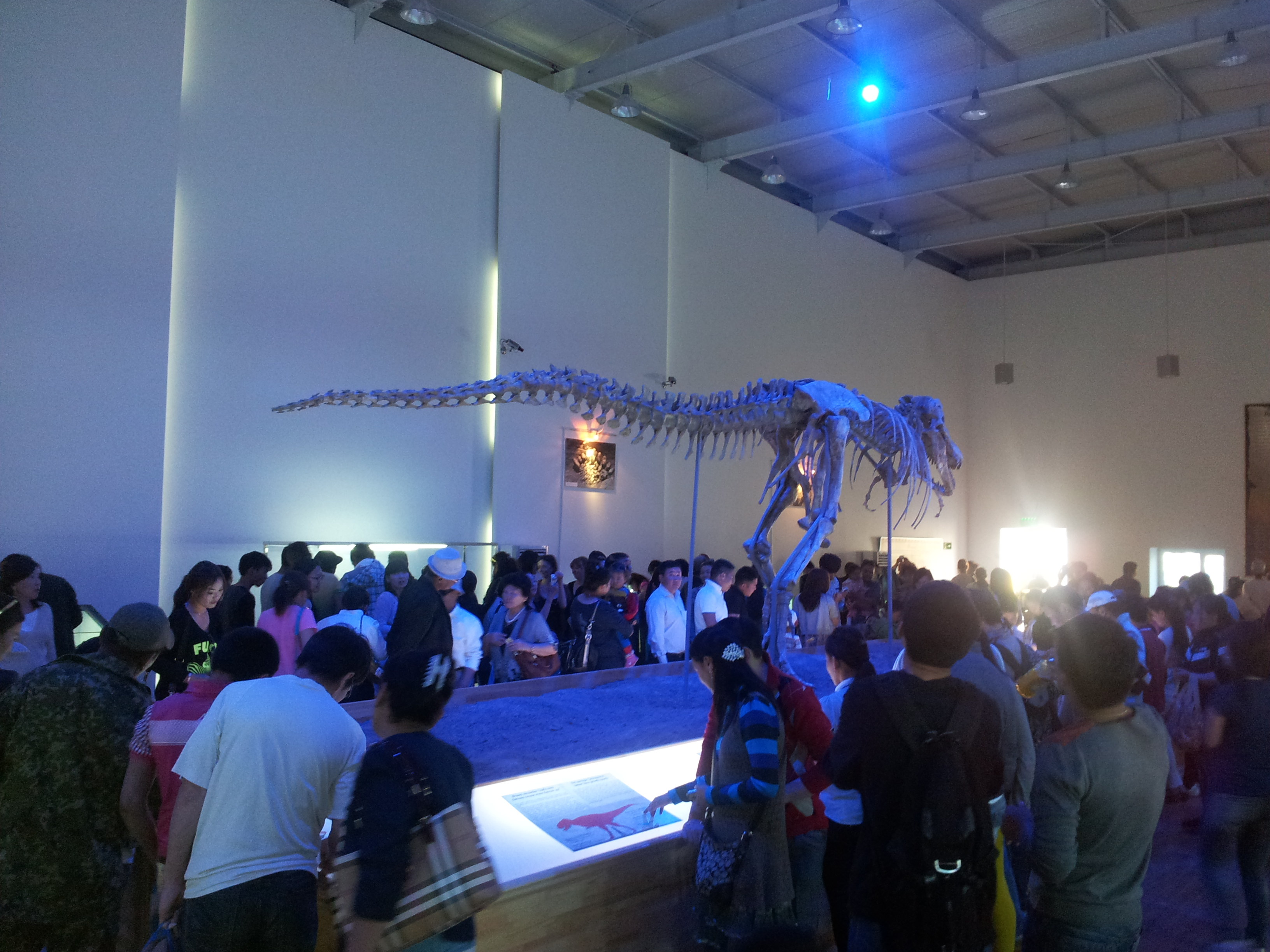 Repatriated Tarbosaurus bataar in Mongolia.